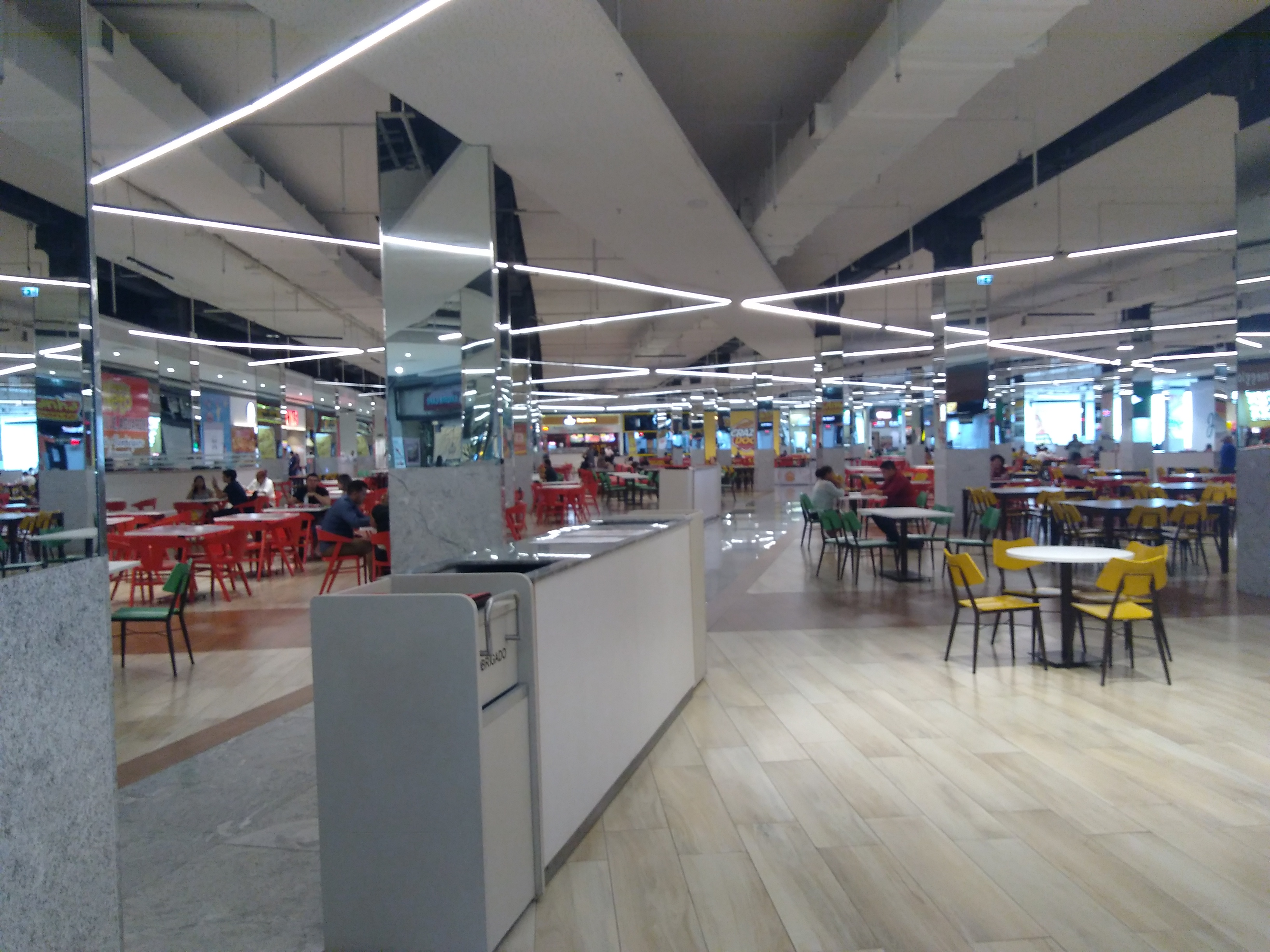 Interior do Shopping Metrópole Ananindeua, da cidade de Ananindeua, Pará